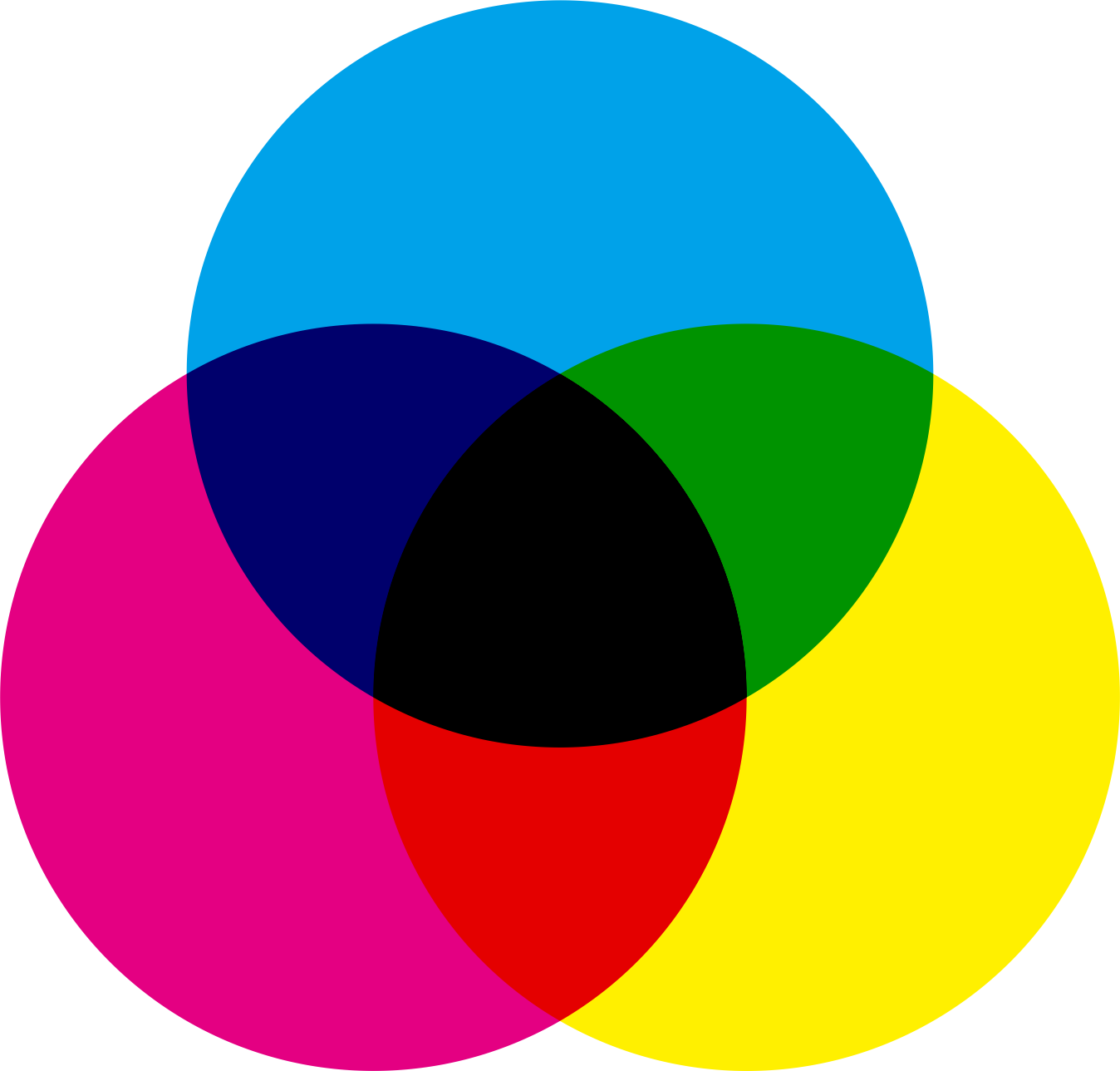 中文（台灣）: 一般CMY油墨疊印混色示意圖